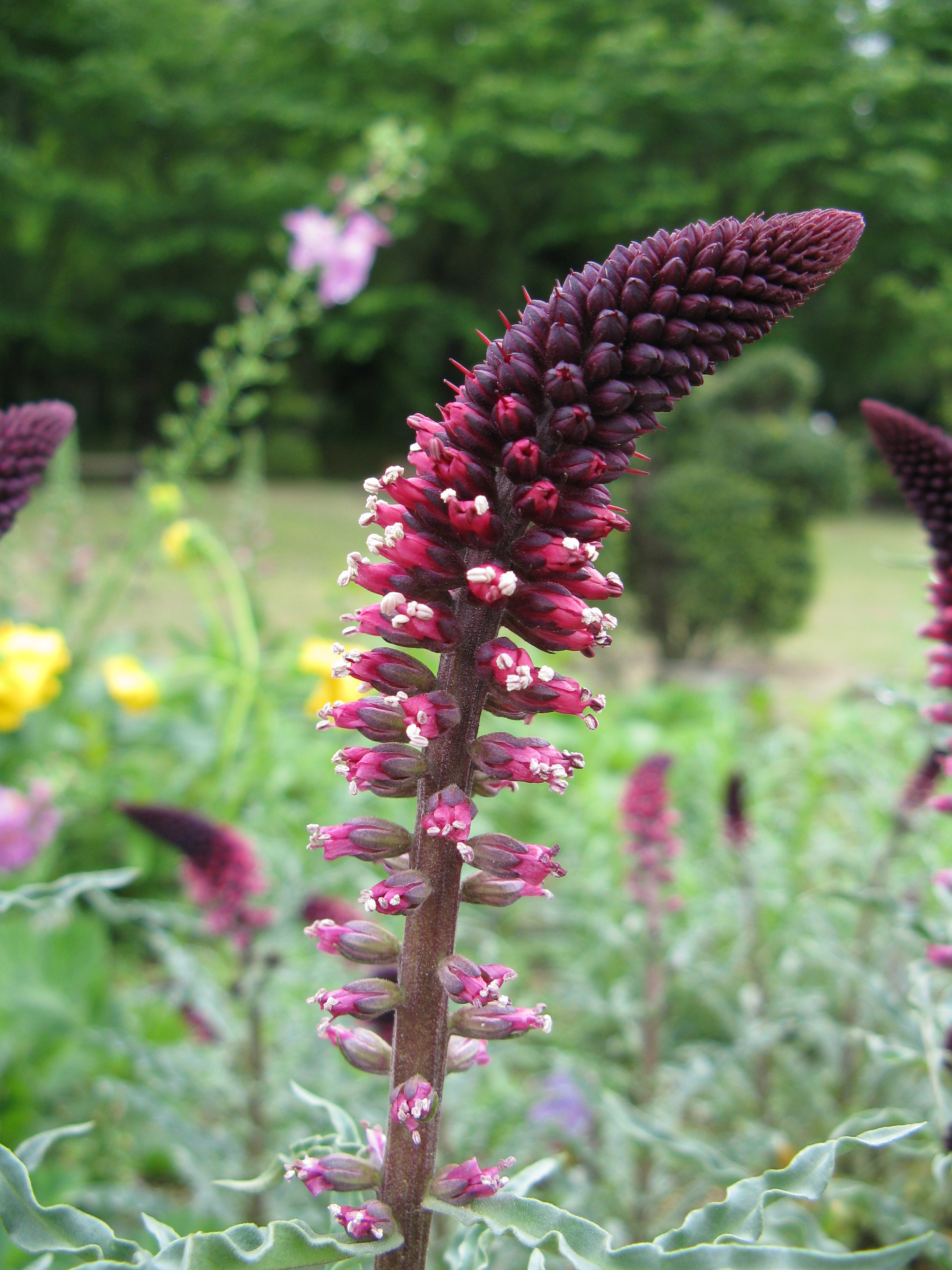 Lysimachia atropurpurea 'Beaujolais'